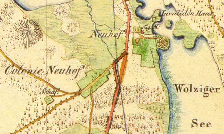 Neuhof, Wolziger Mühle und Schlotthorst auf dem Urmesstischblatt (Blatt 3846 Wünsdorf, 1841), heute Wünsdorf, Ortsteil der Stadt Zossen, Brandenburg, Deutschland